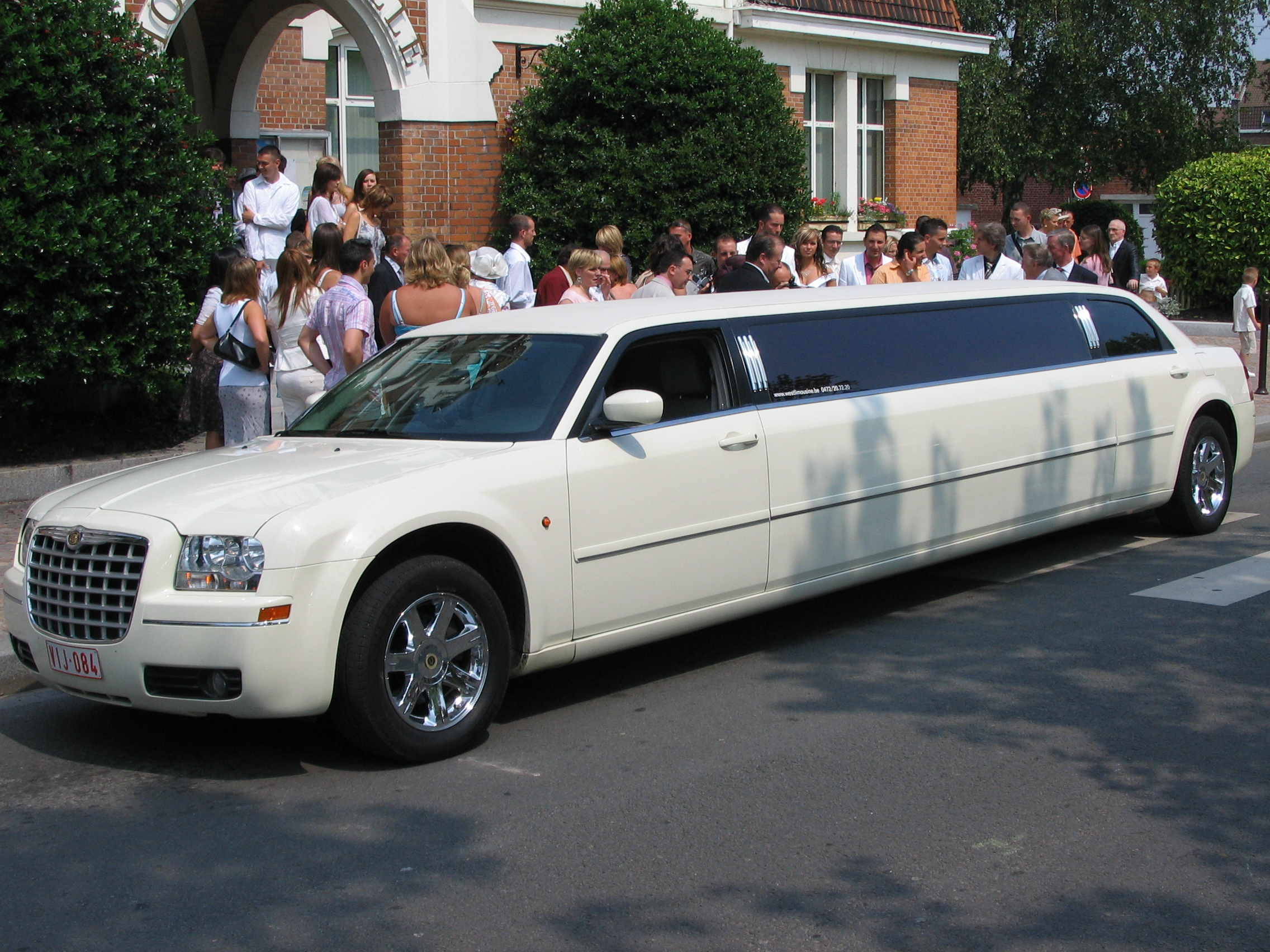 Chrysler 300 limousine lors d'un mariage, bas hôtel de ville Quesnoy-sur-deûle (Nord).